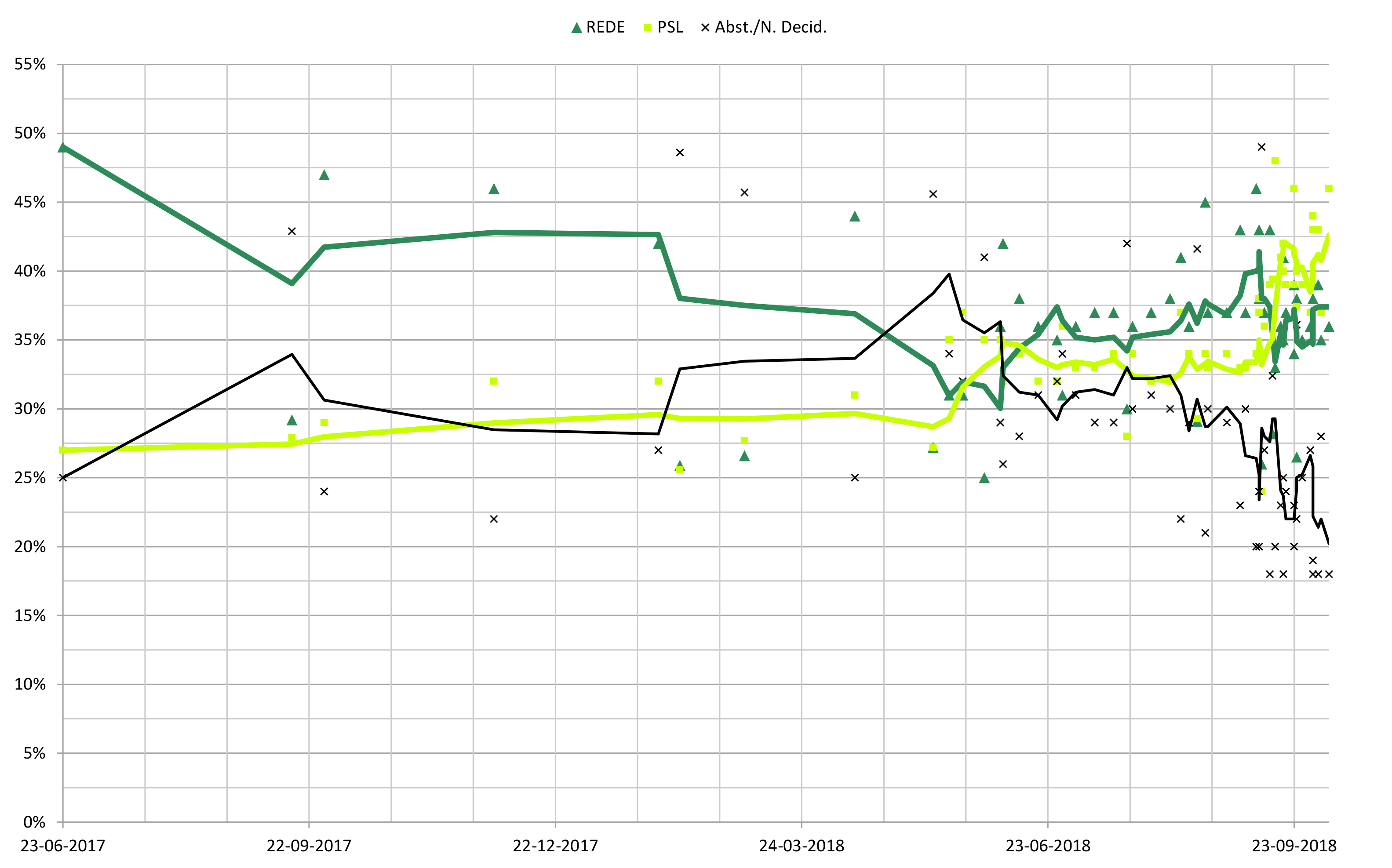 Graph showing 5 poll average trend lines of Brazilian opinion polls for the second round of presidential election between Jair Bolsonaro (PSC) and Marina Silva (REDE) from June 2017 to the most recent one. Based on data at